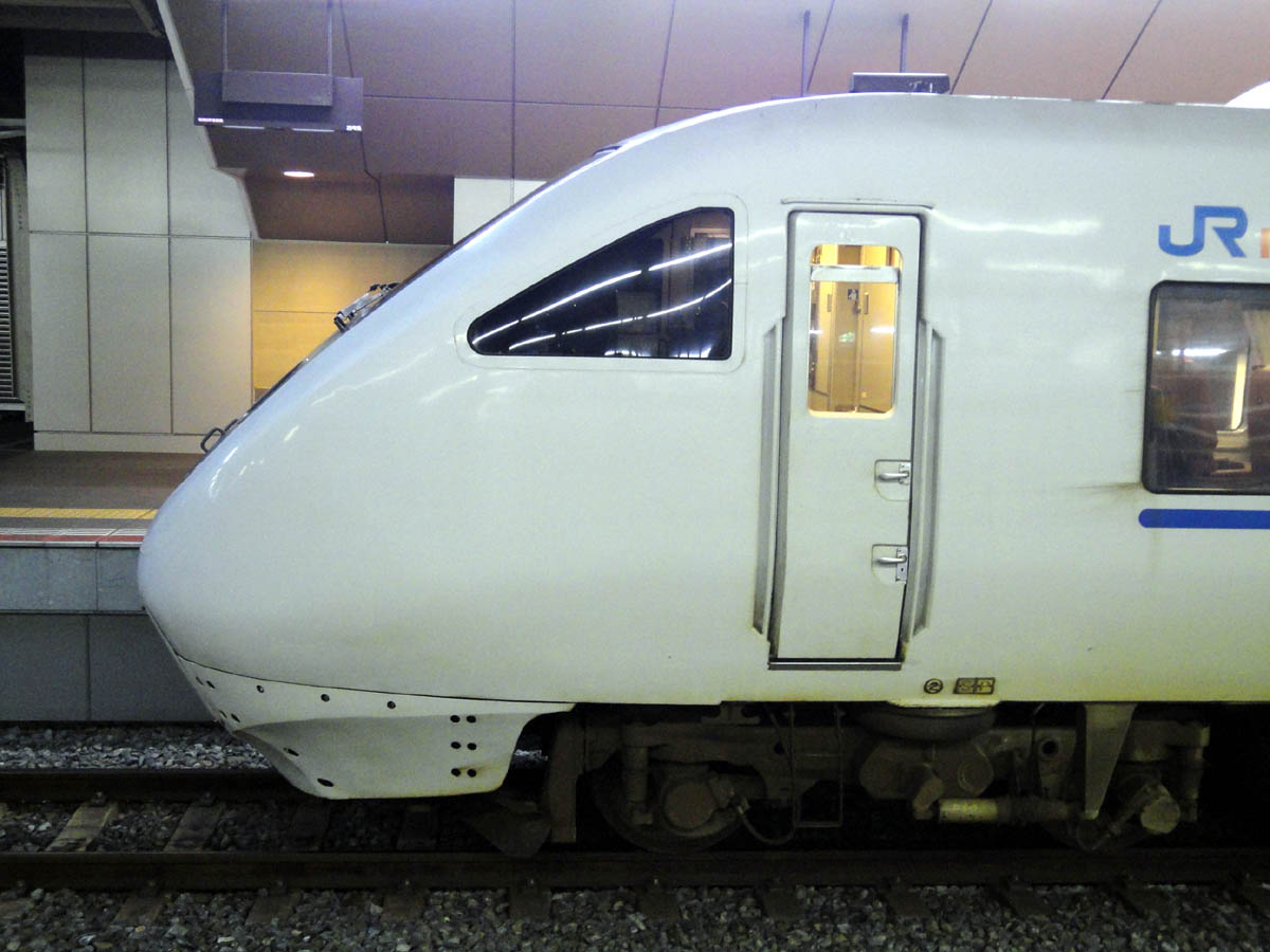 JR西日本 681系1000番台 先頭車側面部